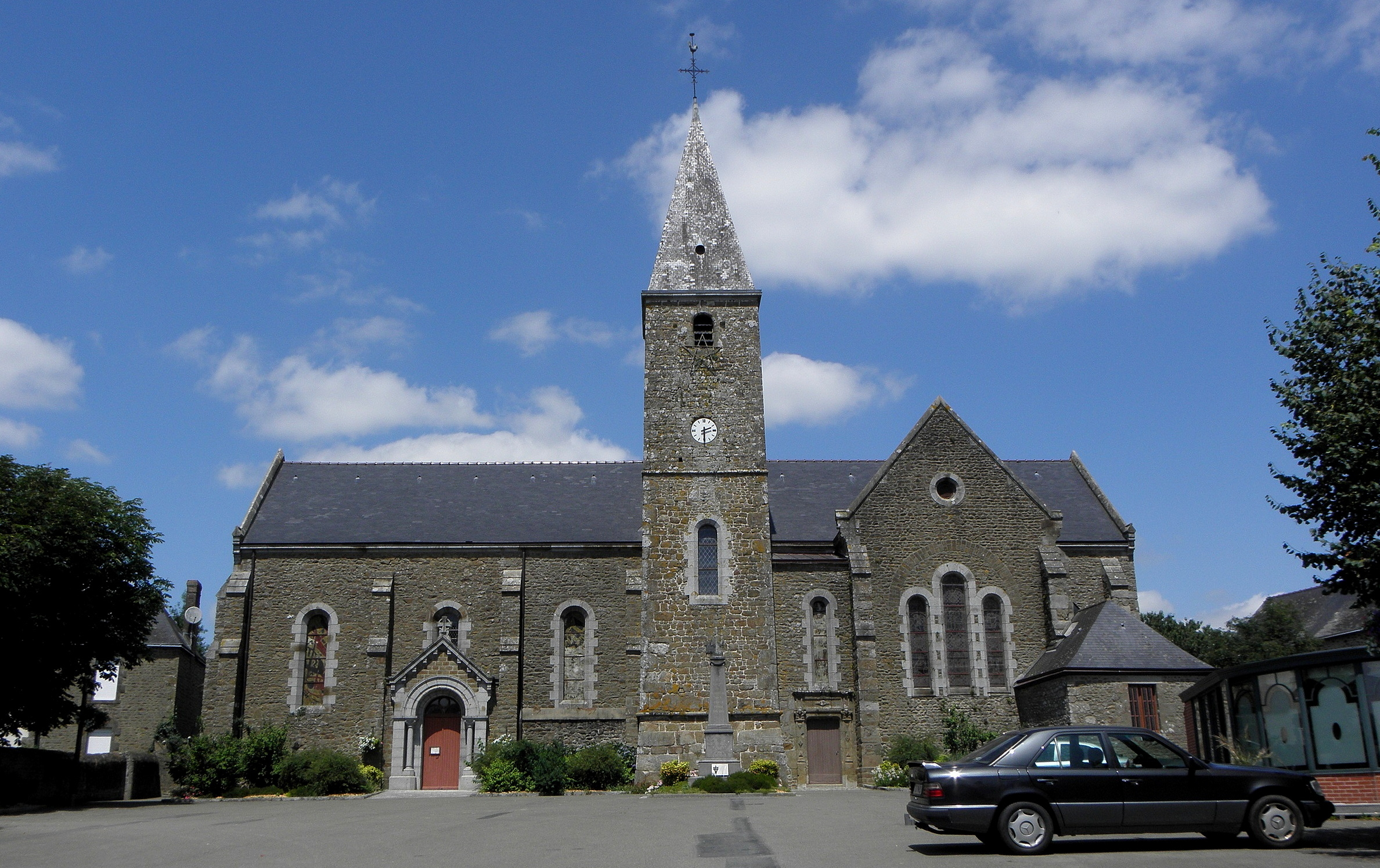 Église Saint-Médard de Champéon (53).